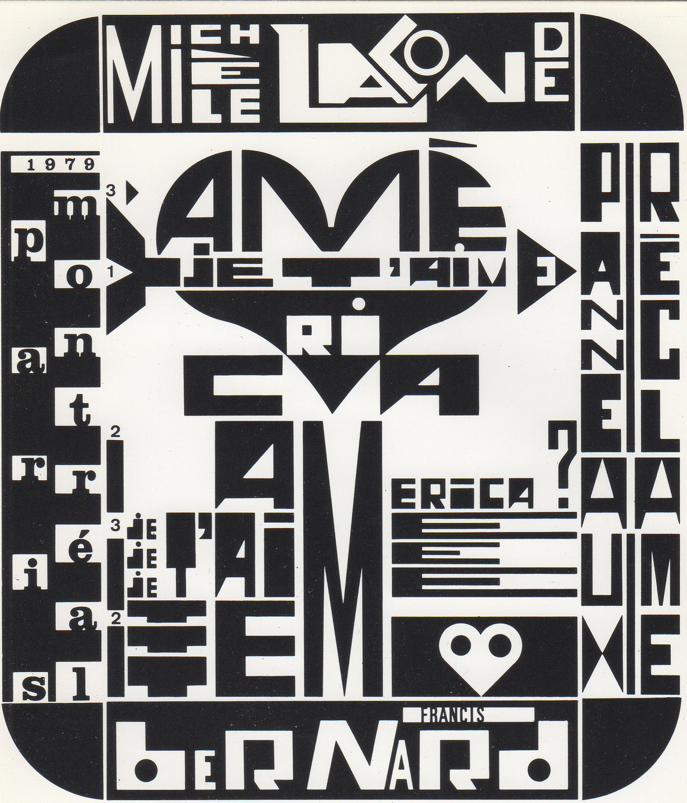 "AMERICA", traitement graphique du poème de Michèle Lalonde par Francis Bernard